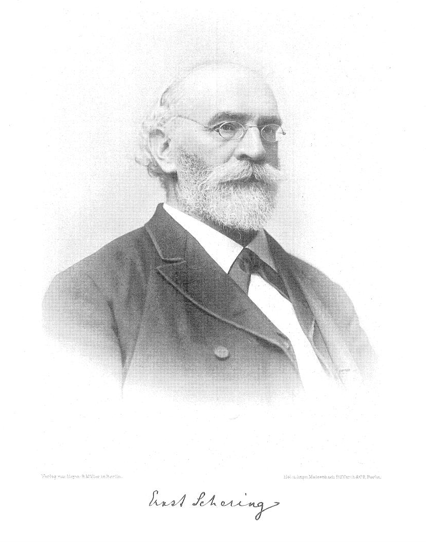 Bildnis des Mathematikers Ernst Christian Julius Schering (1833-1897). Stahlstich